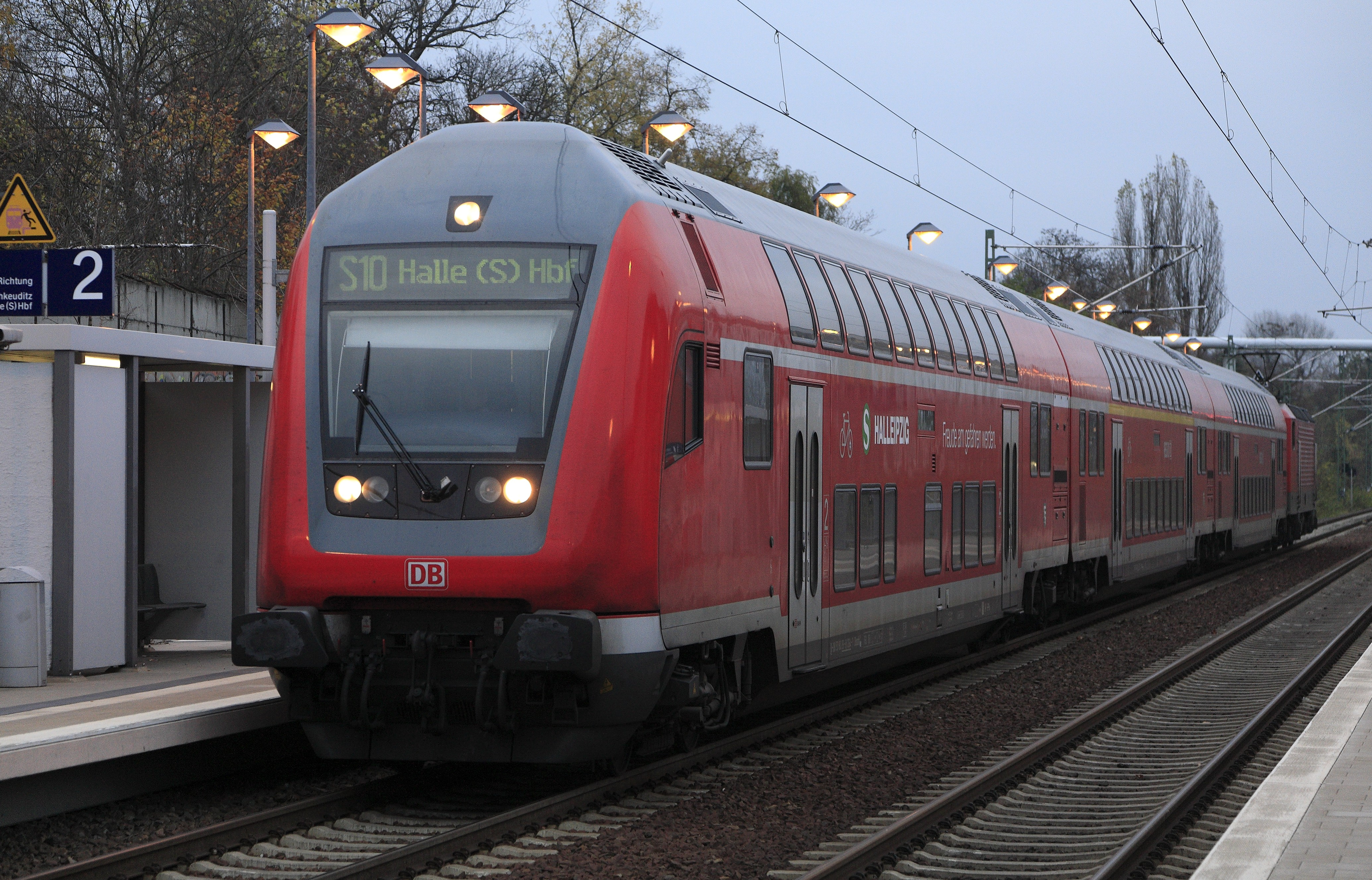 S-Bahn Zug, Linie S10 Leipzig–Halle, vier Wochen vor der Betriebsumstellung. Noch verkehren auf dieser Strecke die Doppelstockwendezüge.